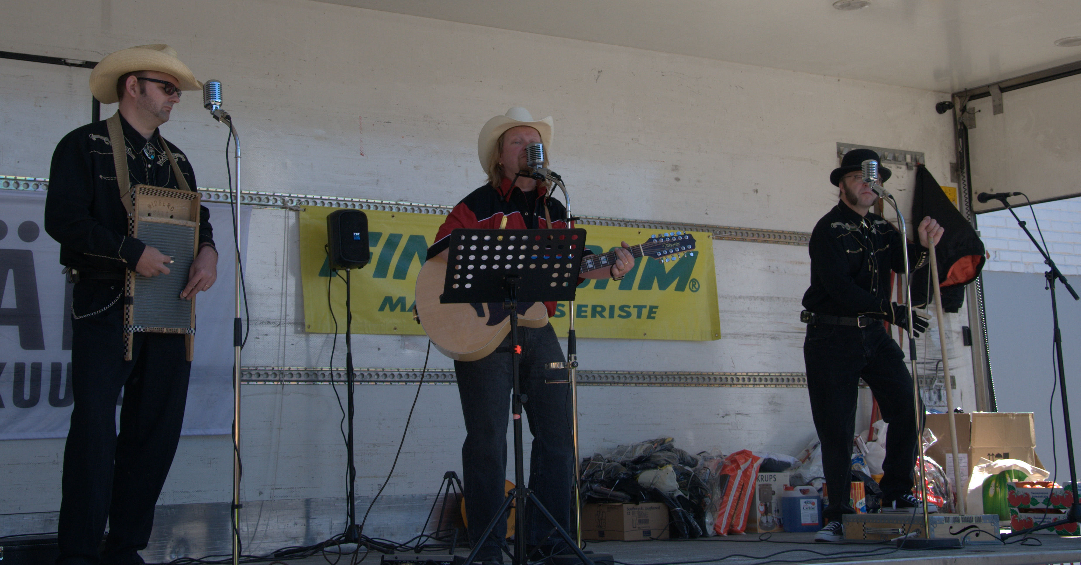 Southwest Skiffle Boys suomalainen yhtye